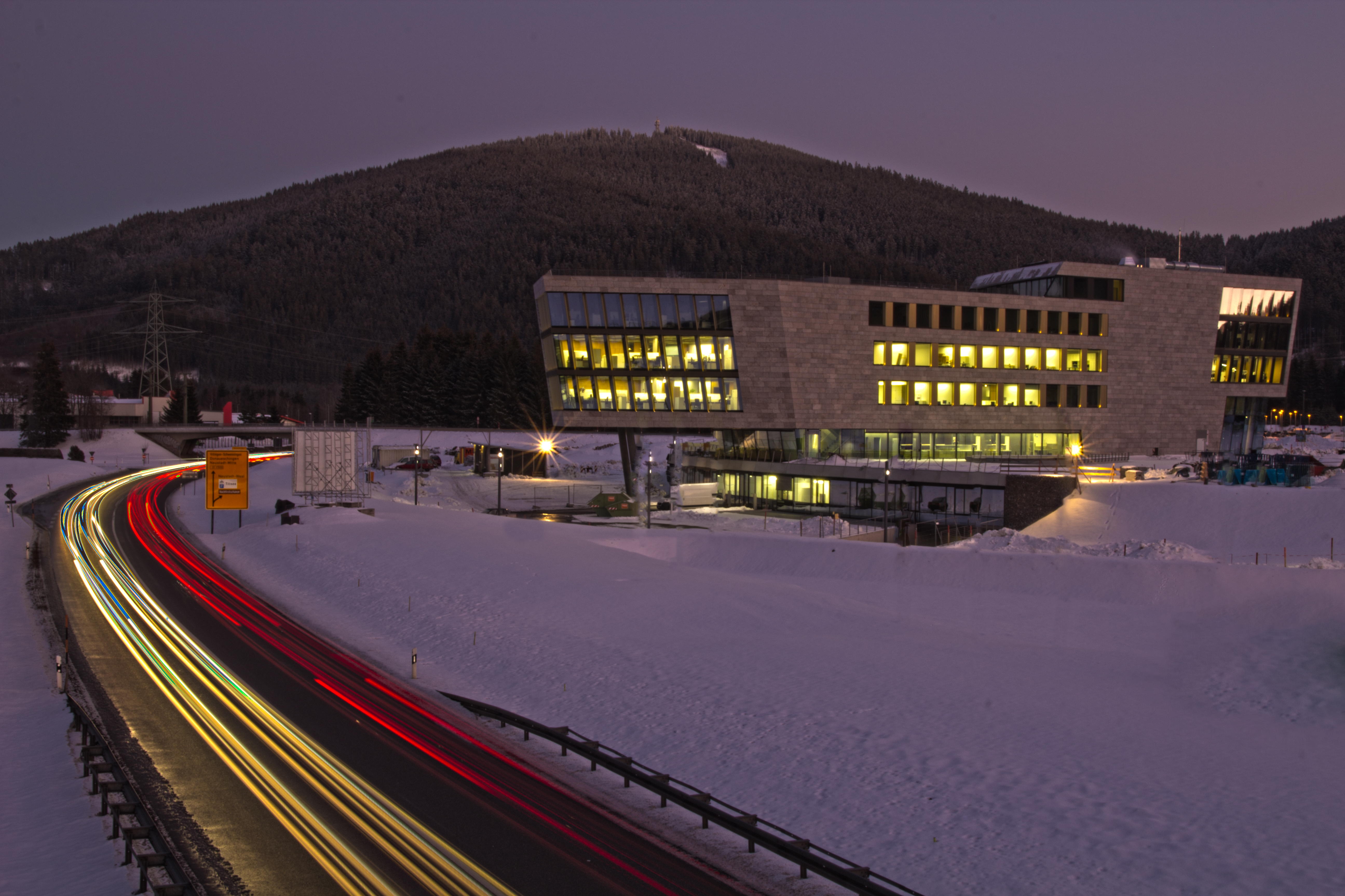 Der Testo-Neubau in Titisee an der B 31